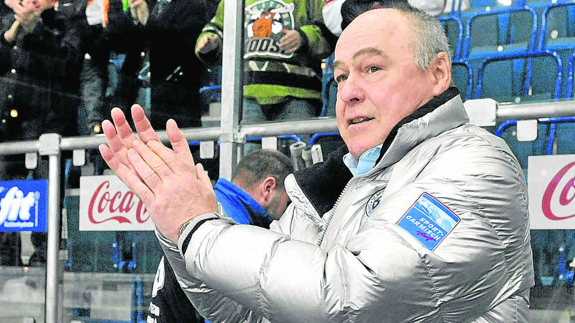 Unerwarteter Abschied: Gerhard Brunner zieht sich aus dem Eishockey zurück.